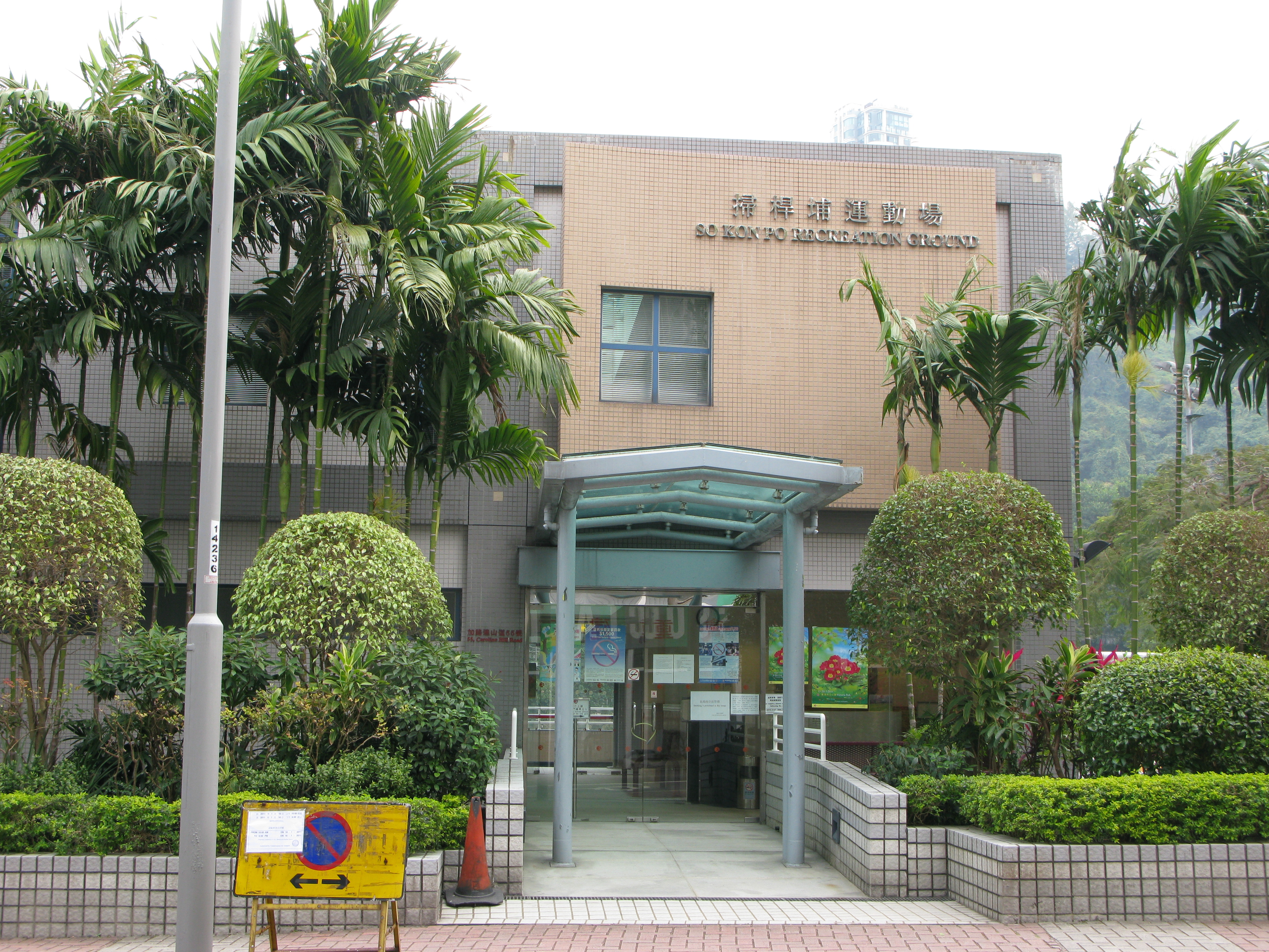 中文（香港）: 香港銅鑼灣加路連山道掃桿埔遊樂場